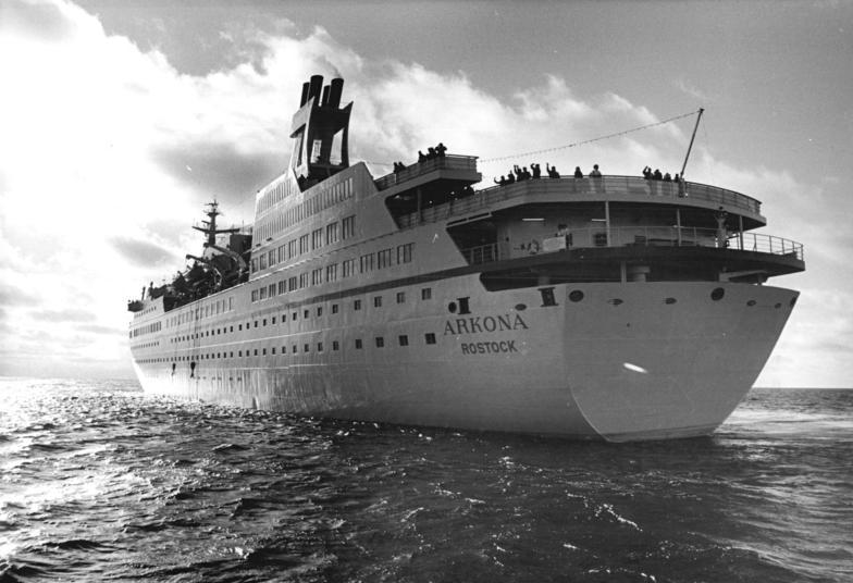 Zum Beitrag: Die "Belegschaft" von Kabine 601 - Mit der "Arkona" auf Ostseekurz ADN-ZB Link- 19.11.1985 Das im Oktober in Dienst gestellte FDGB-Urlauberschiff "Arkona" auf seiner ersten Fahrt Richtung Leningrad.